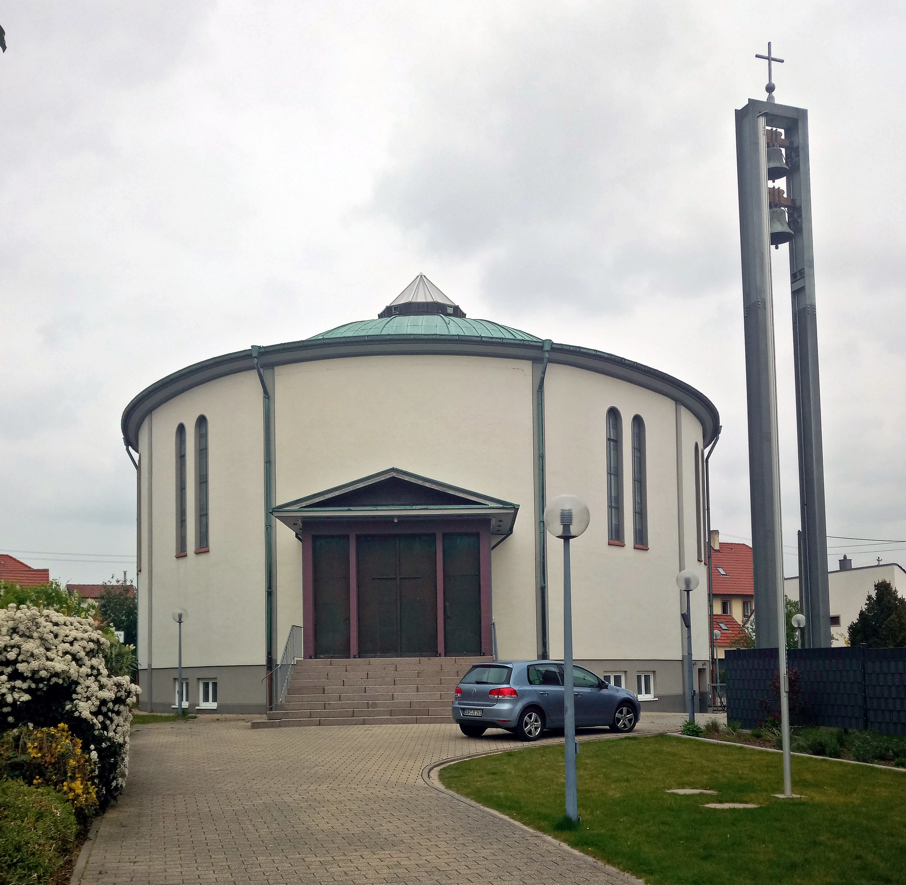 Johanneskirche Mußbach